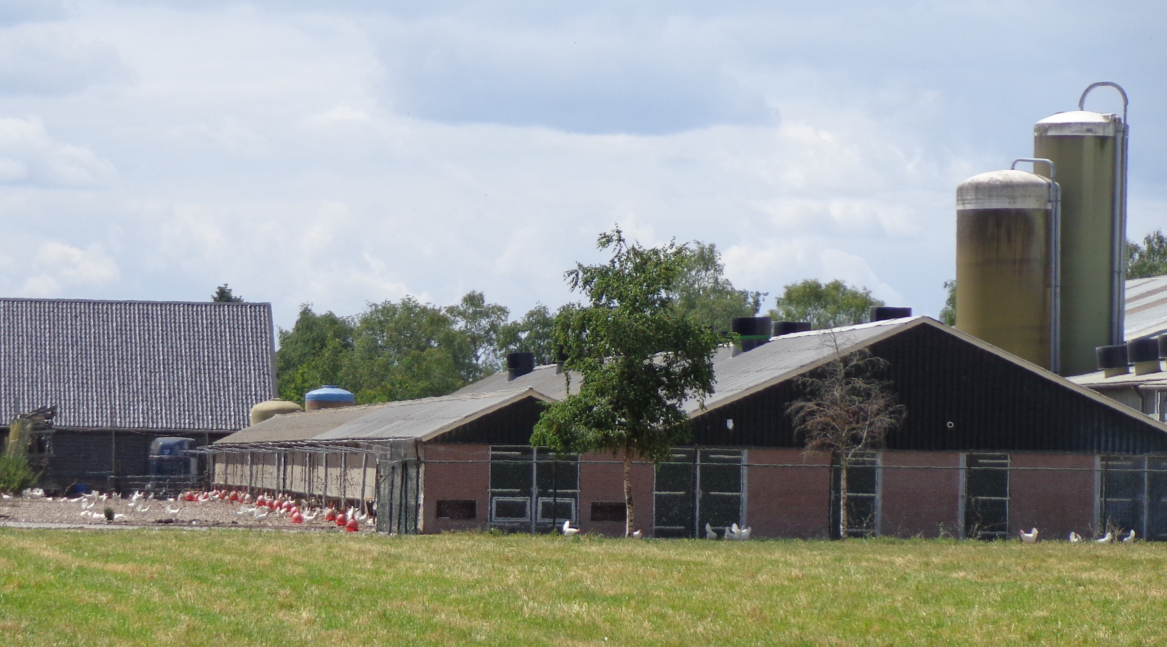 Kippenhok in Scherpenzeel